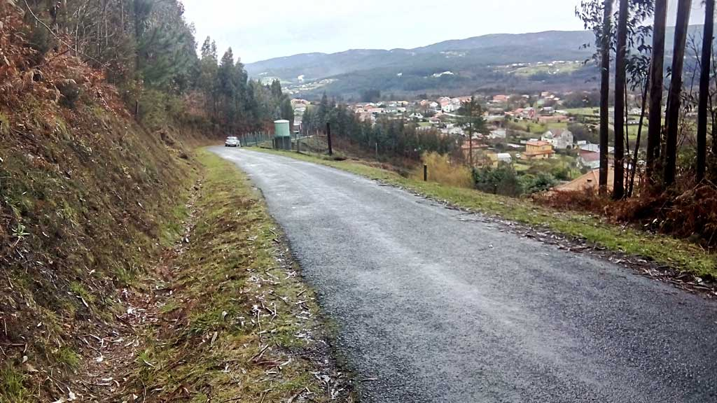 Acceso á Corredoira, Pedroso, Narón.